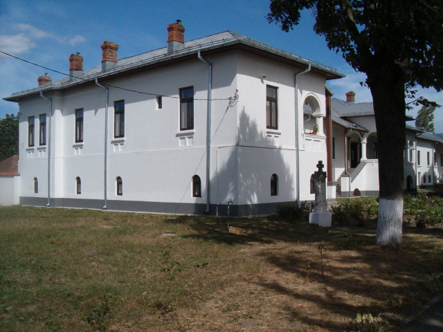 Corpul de chilii 03